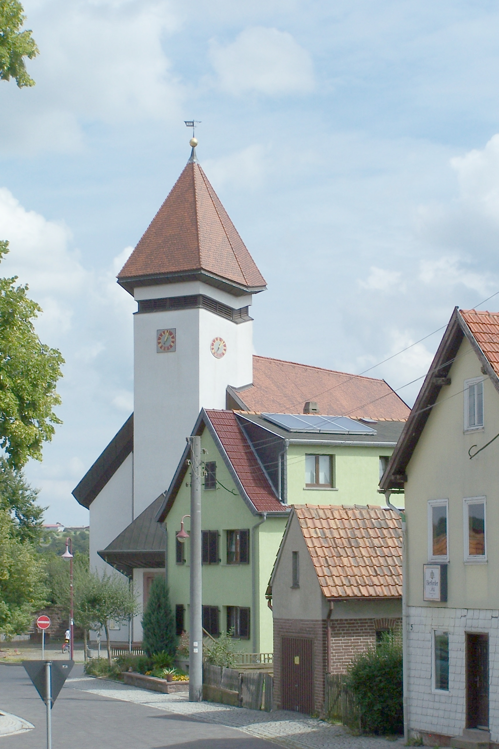 Ansichten und Details zur Michaeliskirche.